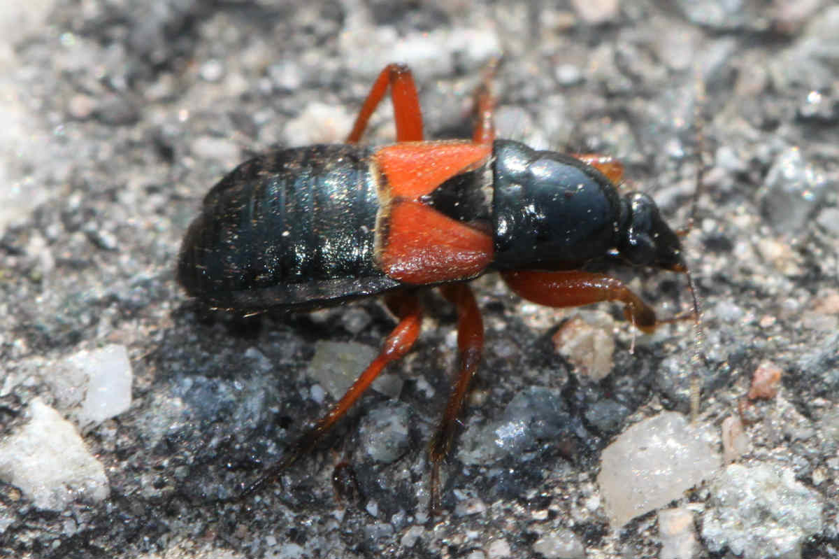 Prostemma guttula am 3.4.2017 in Walldorf/Baden